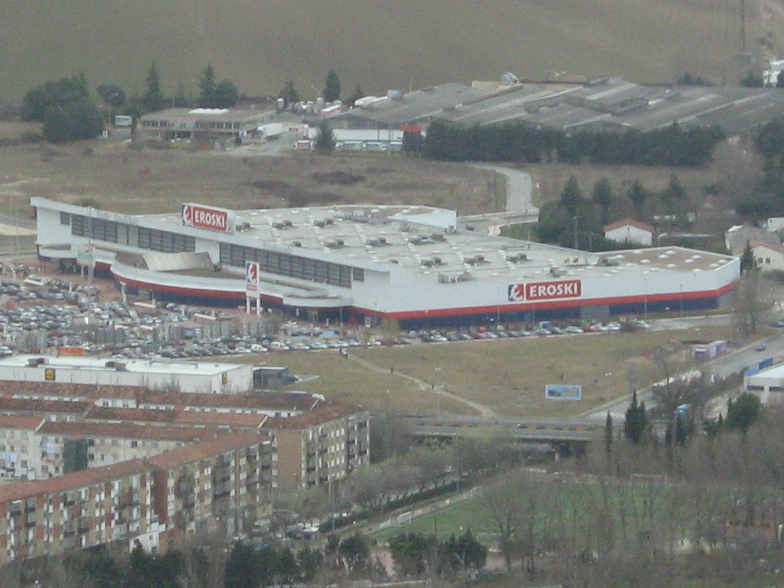 Vista del Hipermercado Eroski del Centro Comercial Iruña en Barriozar desde el Monte Ezkaba de Pamplona.